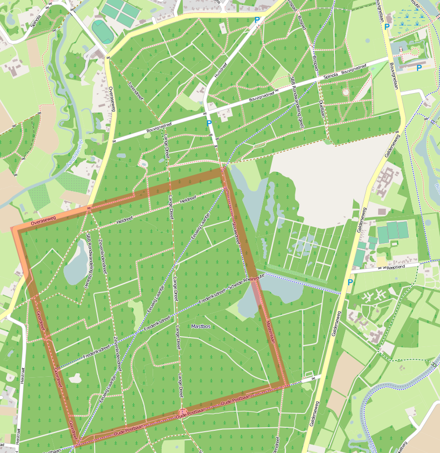 Vierkant van Maurits in het mastbos op kaart openstreetmap